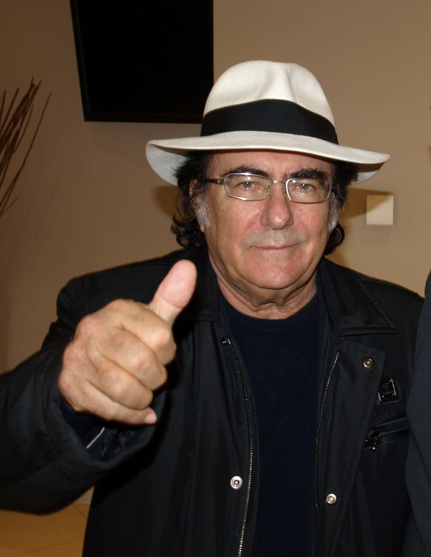 Albano Carrisi, włoski piosenkarz